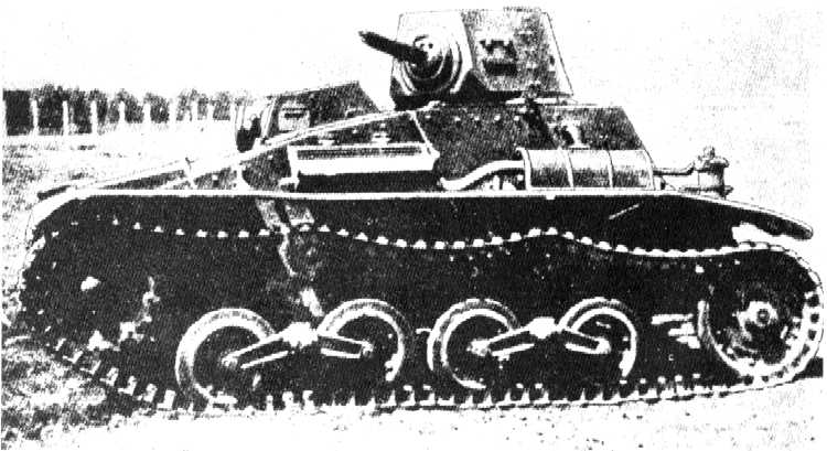 Late model Japanese Type 94 tankette